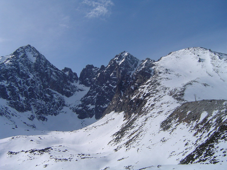 Lomnicky stit (left), Kezmarsky stit (middle) and Huncovsky stit (right) from Skalnate pleso